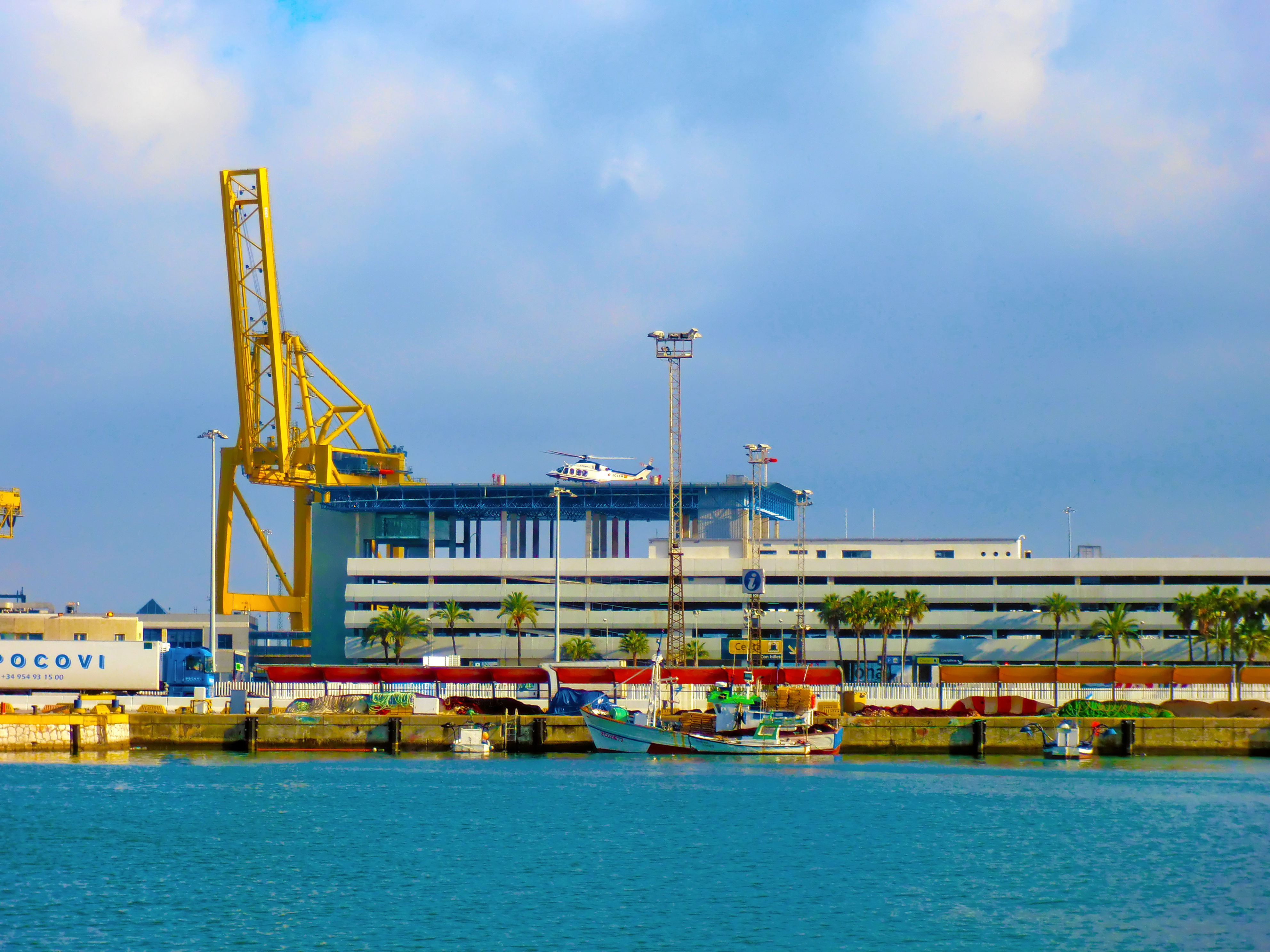 Helipuerto de Algeciras desde el LLano Amarillo